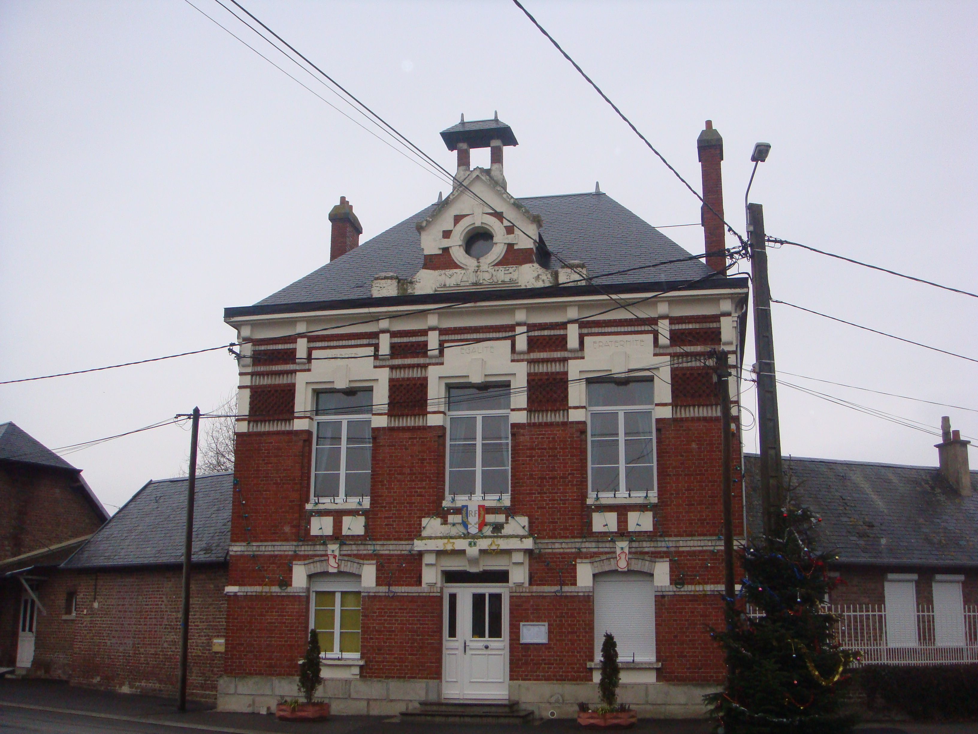 Mairie de Remies.